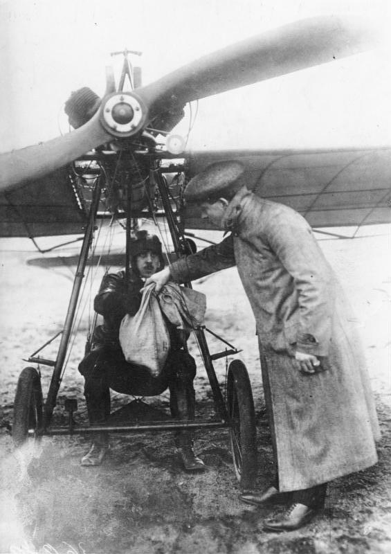 Luftpost Zentralbild Die erste deutsche Luftpost zwischen Bork und Brück (in der Mark Brandenburg) im Jahre 1912. [Mann übergibt sitzendem Piloten in Flugzeug einen Postsack]